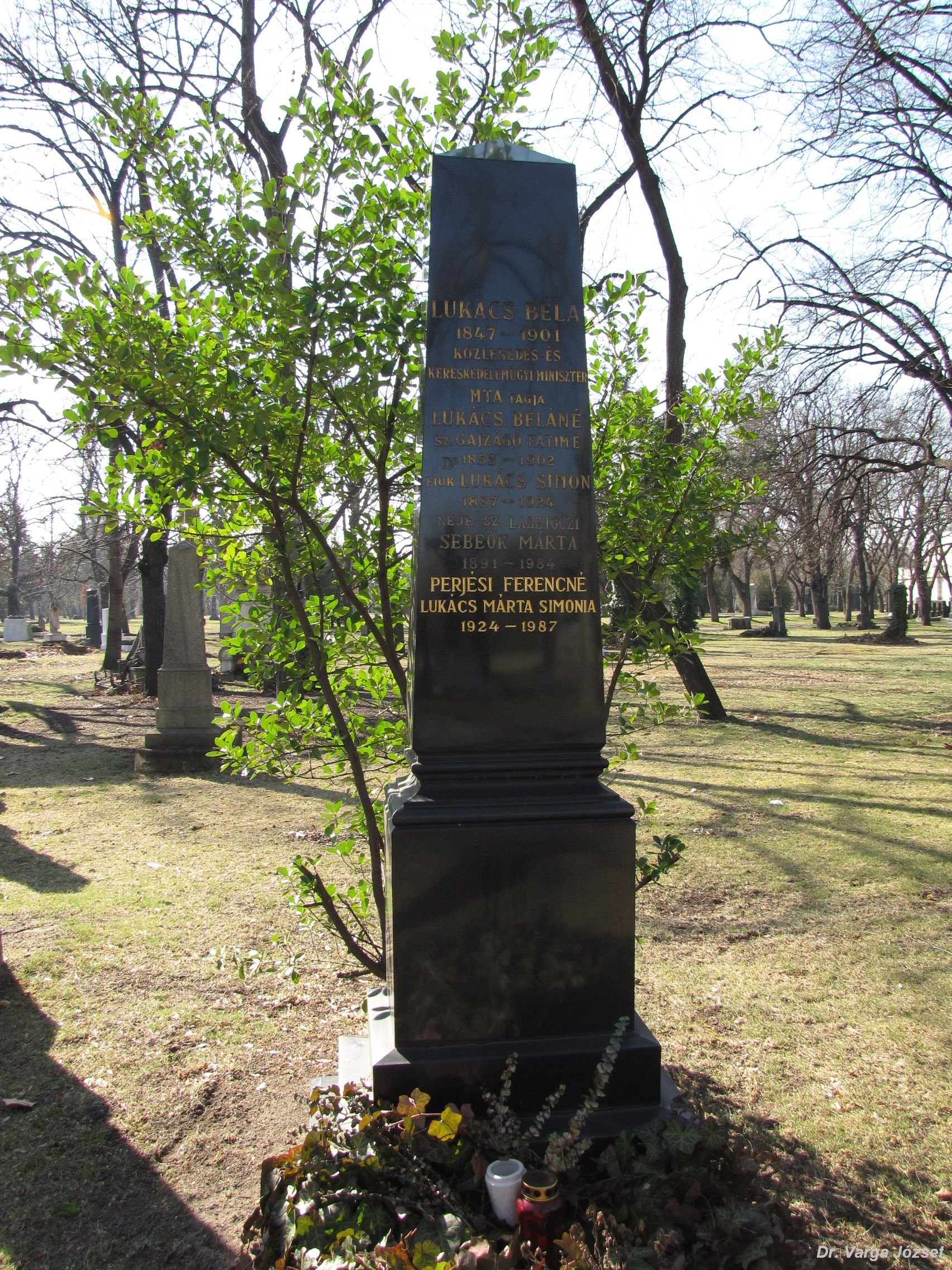 Lukács Béla (Zalatna, 1847. április 27. – Budapest, 1901. január 7.) politikus, országgyűlési képviselő, államtitkár, kereskedelmi és közlekedési miniszter sírja Budapesten. Kerepesi temető: 29/2-1-3.